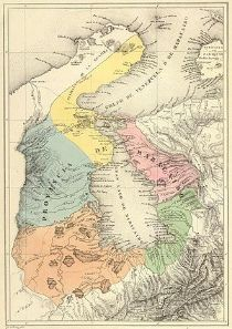 Provincia de Maracaibo. Tomado del "Atlas físico y político de la República de Venezuela", 1840